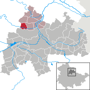 Herrnschwende in Thuringia - District Sömmerda